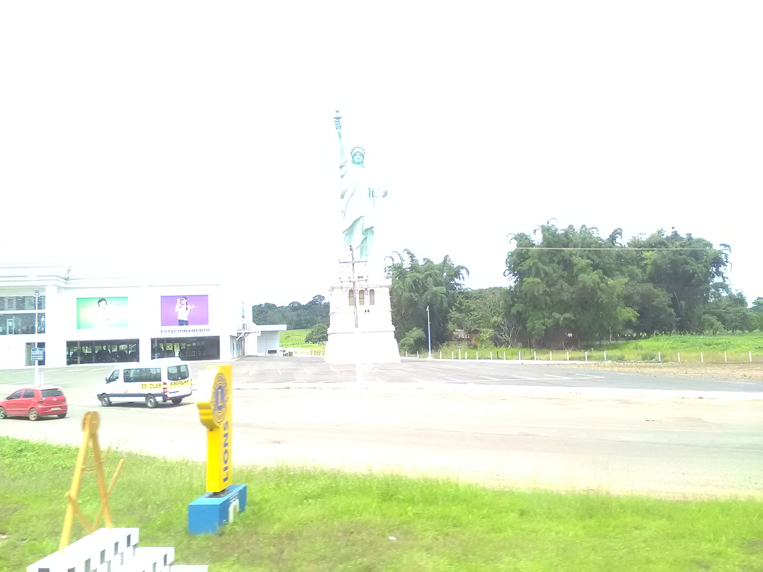 העתק של פסל החירות